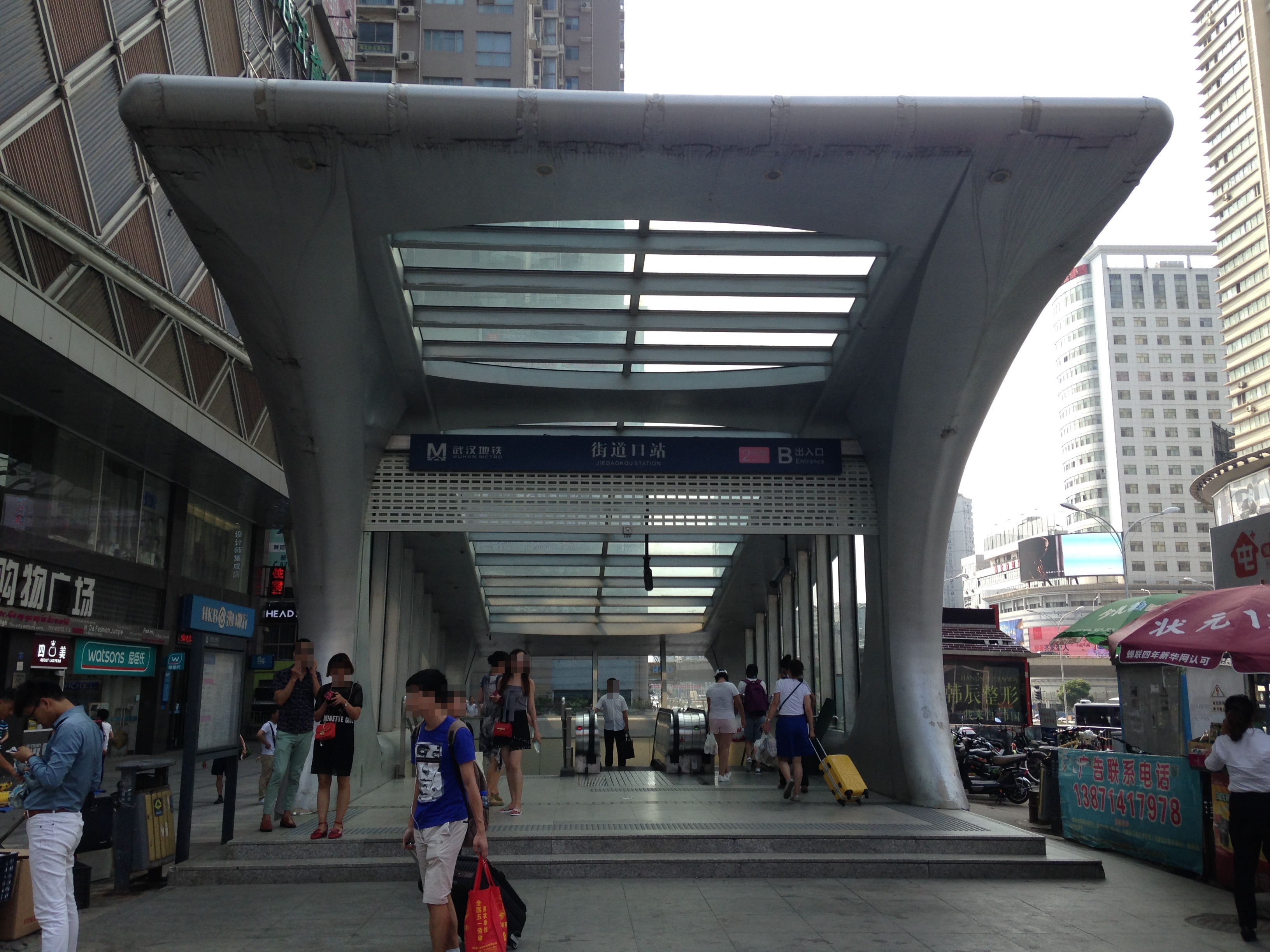 街道口駅の2番出入り口